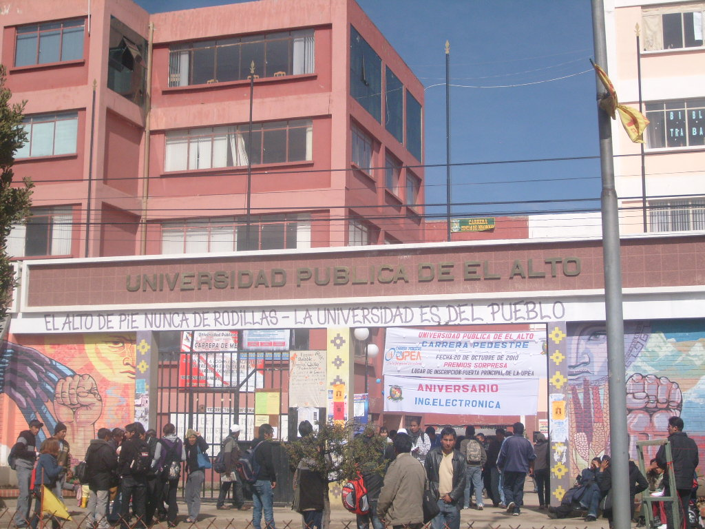 Entrada principal del primer bloque de la Universidad Pública de El Alto. Trabajo propio liberado como dominio público por Leandro Quispe, durante el taller de wikipedia del Proyecto Igualdad Digital.